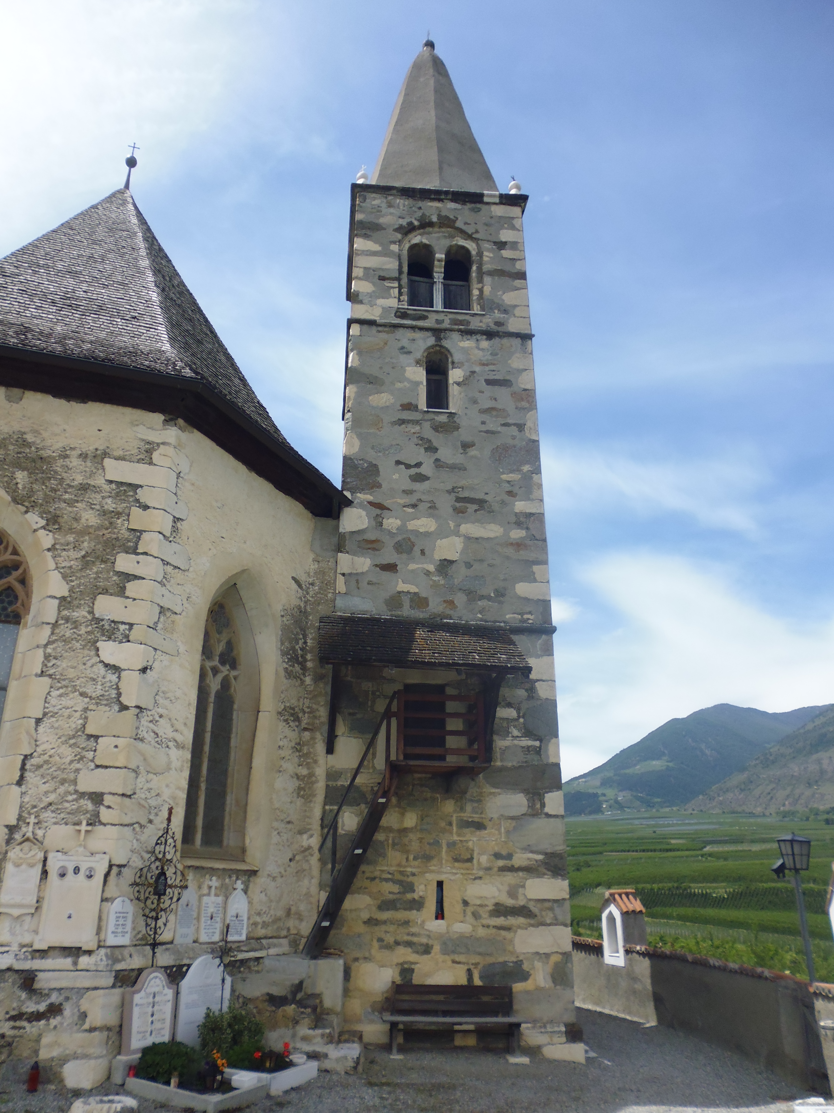 Pfarrkirche St. Martin in Göflan